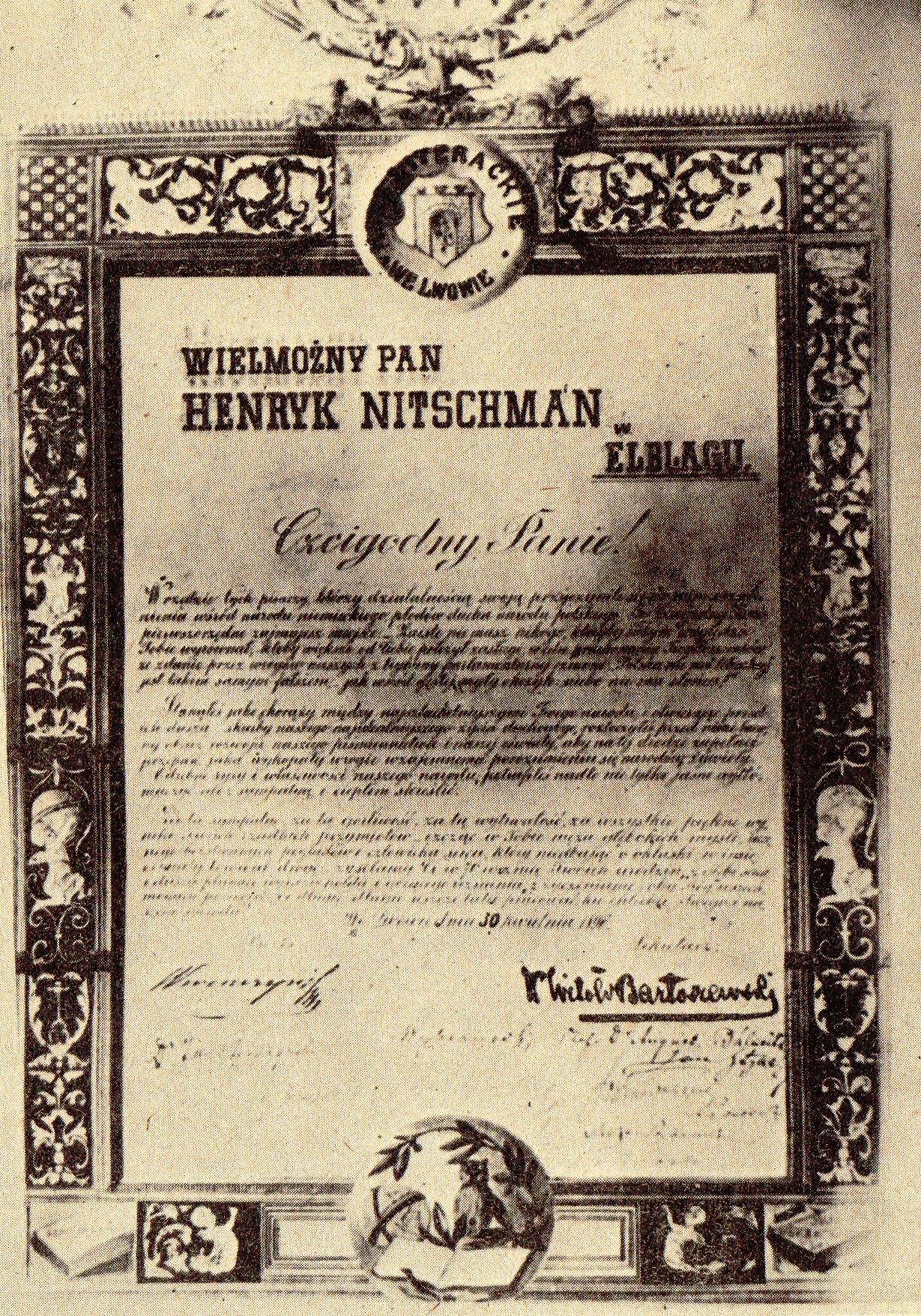 List do Henryka Nitschmanna na 70. urodziny od członków koła literackiego ze Lwowa.